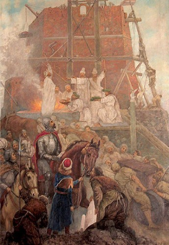 Беларуская (тарашкевіца): Вялікі князь Гедзімін на будоўлі замка ў Вільні (Vilnia)